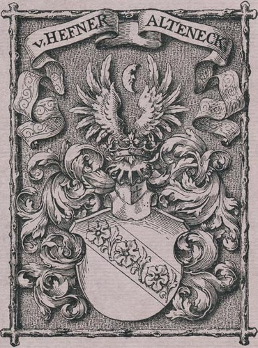 Wappen der Familie von Hefner-Alteneck, Familienmitglied Friedrich von Hefner-Alteneck